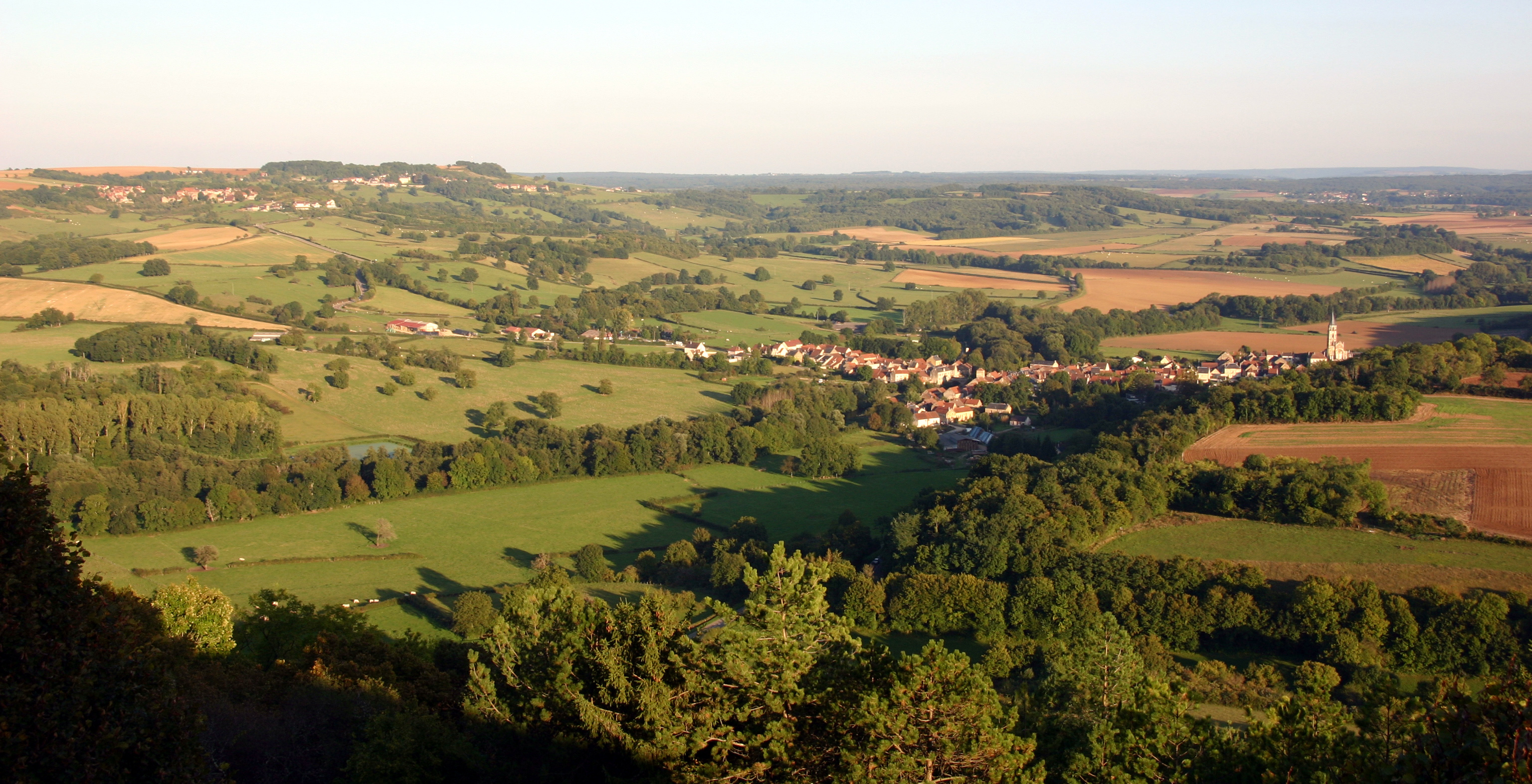 Saint-Père (Yonne)